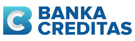 Logo banky CREDITAS